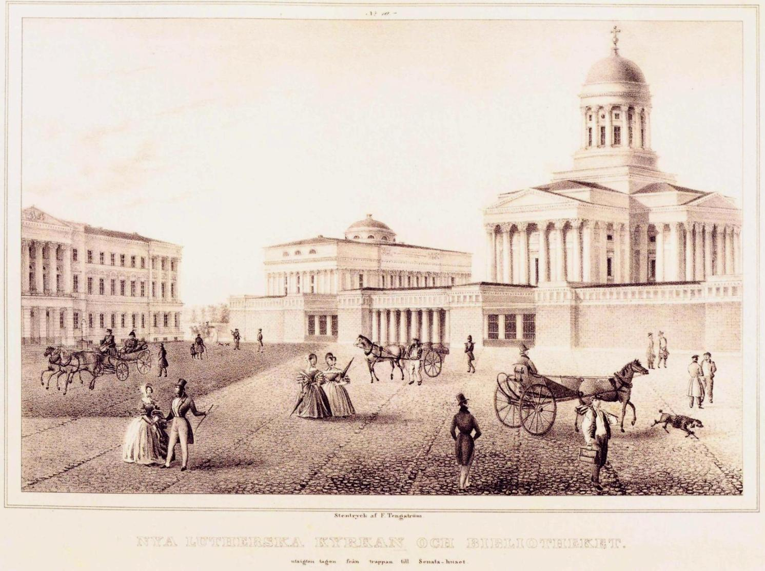 Helsingin Senaatintori, taustalla yliopisto, yliopiston kirjasto ja Nikolainkirkko. Kirkon portaiden paikalla on vielä päävartiorakennus, joka purettiin 1840. Kuva nro 10 Fredrik Tengströmin julkaisemasta litografiasarjasta Vuer af Helsingfors. Osa kuvista oli Tengströmin itse piirtämiä, osa pohjautui Magnus von Wrightin ja C. E. Westlingin luonnoksiin.